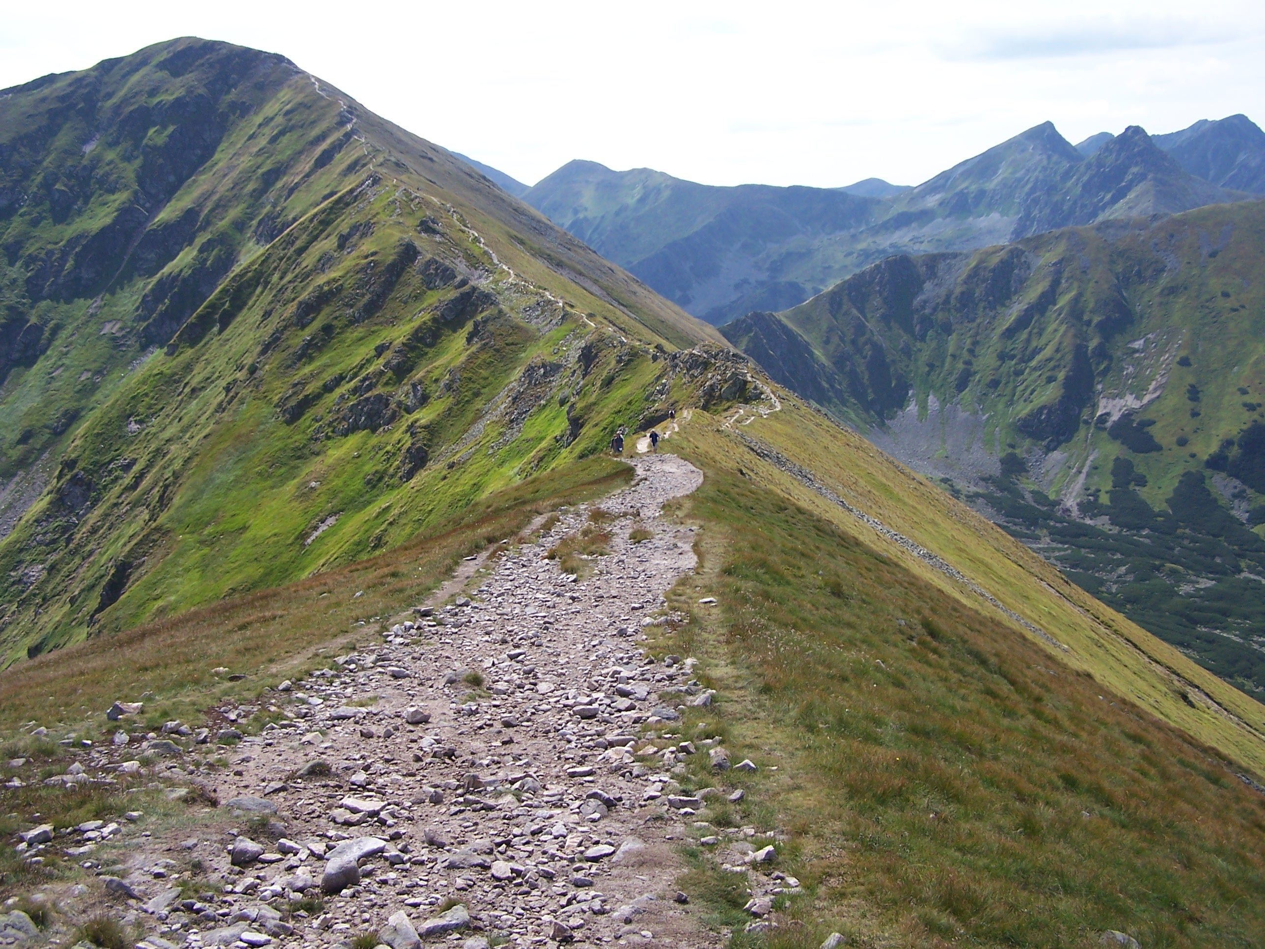 Jarząbczy Wierch(West Tatra Mountains)